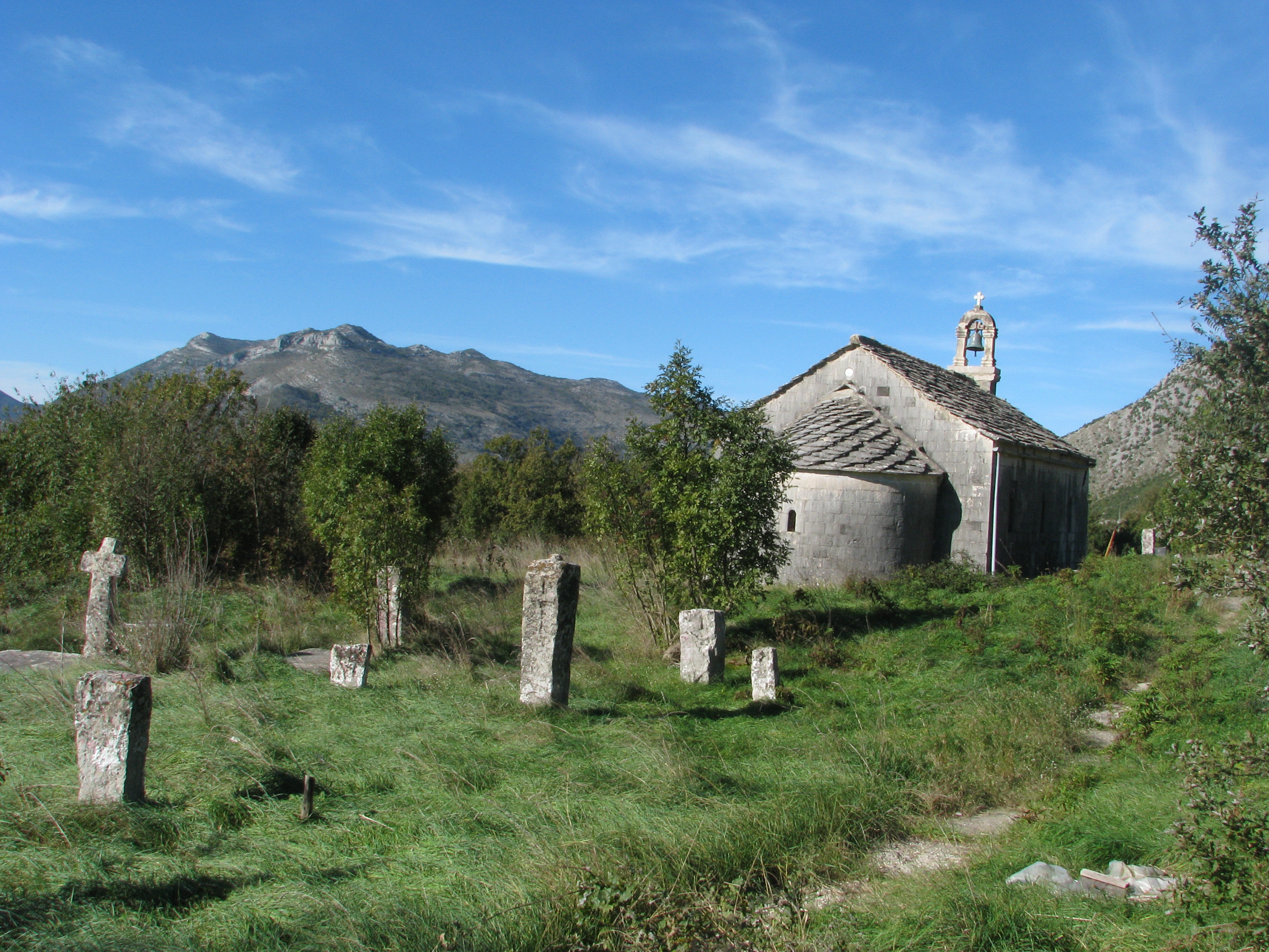 Crkva sv. Arhanđela u selu Veličani u Popovom Polju, u prvom planu stari nadgrobni spomenici. This image was uploaded as part of Trace of Soul 2015.